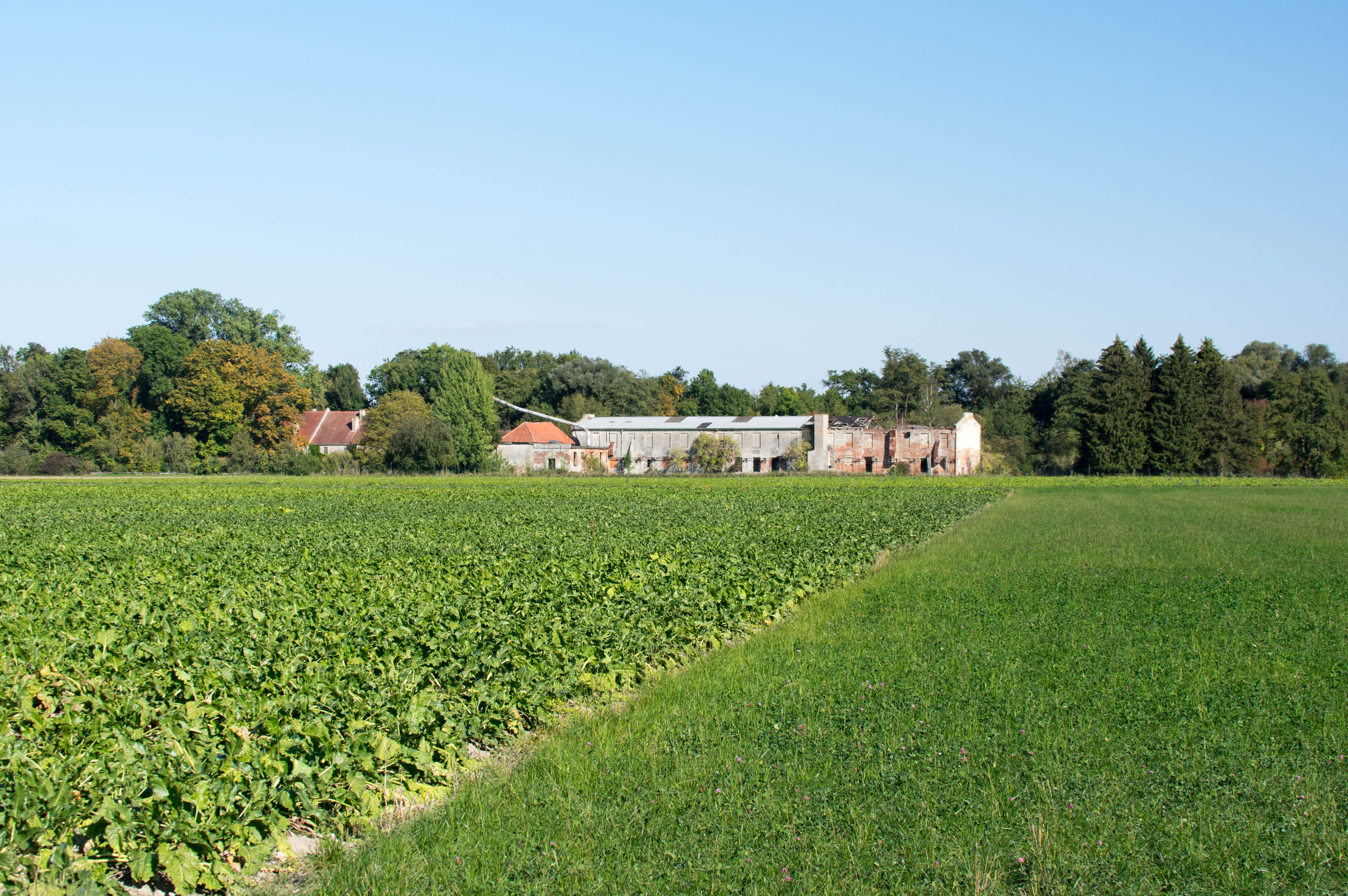 Teilansicht von Westen des Schmutterwäldchens, mit der verfallenden Königsmühle, LSG-00360.01